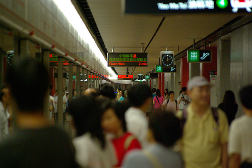 Mong Kok Station